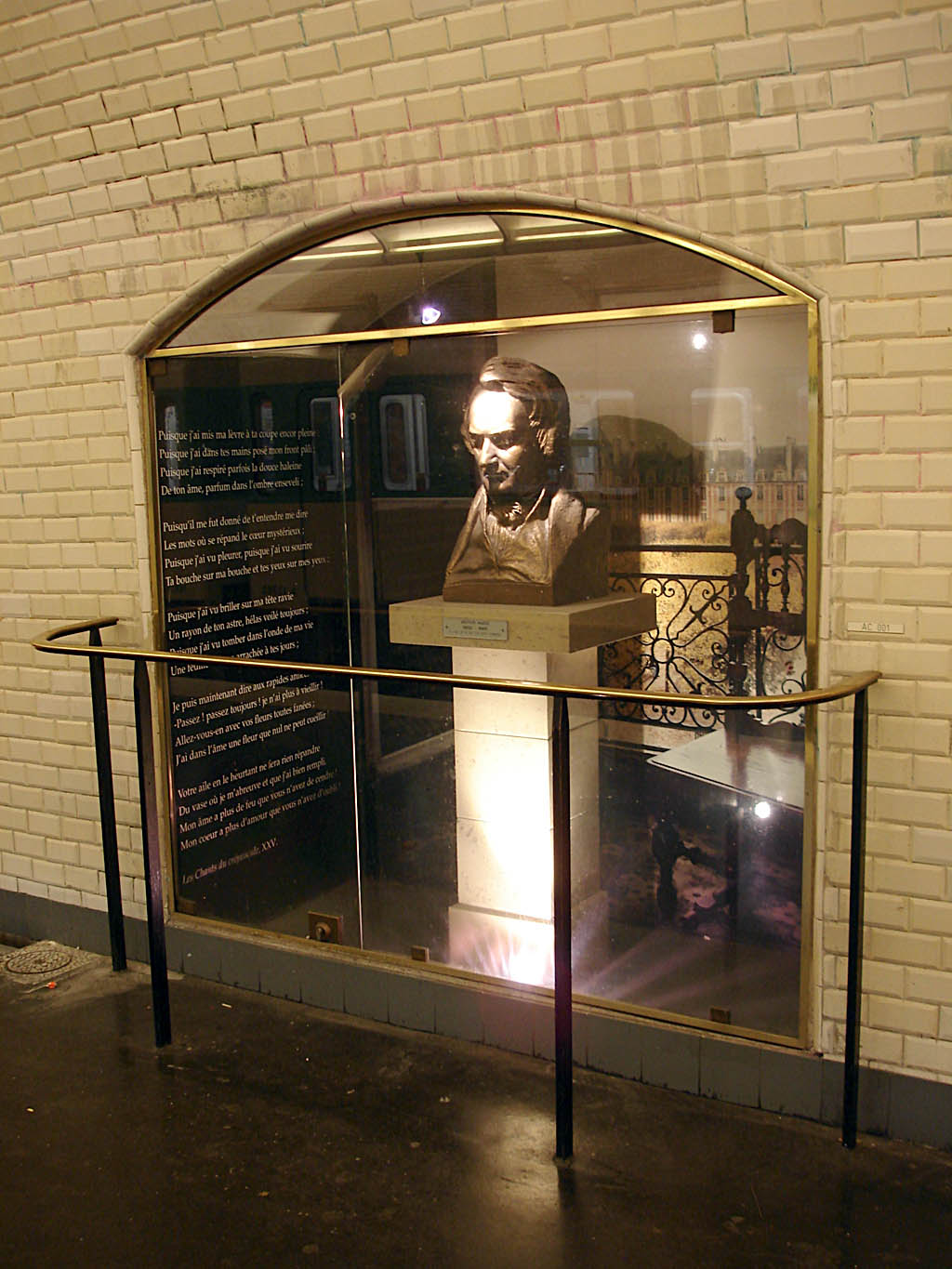 Station Victor Hugo de la ligne 2 du métro de Paris, France.